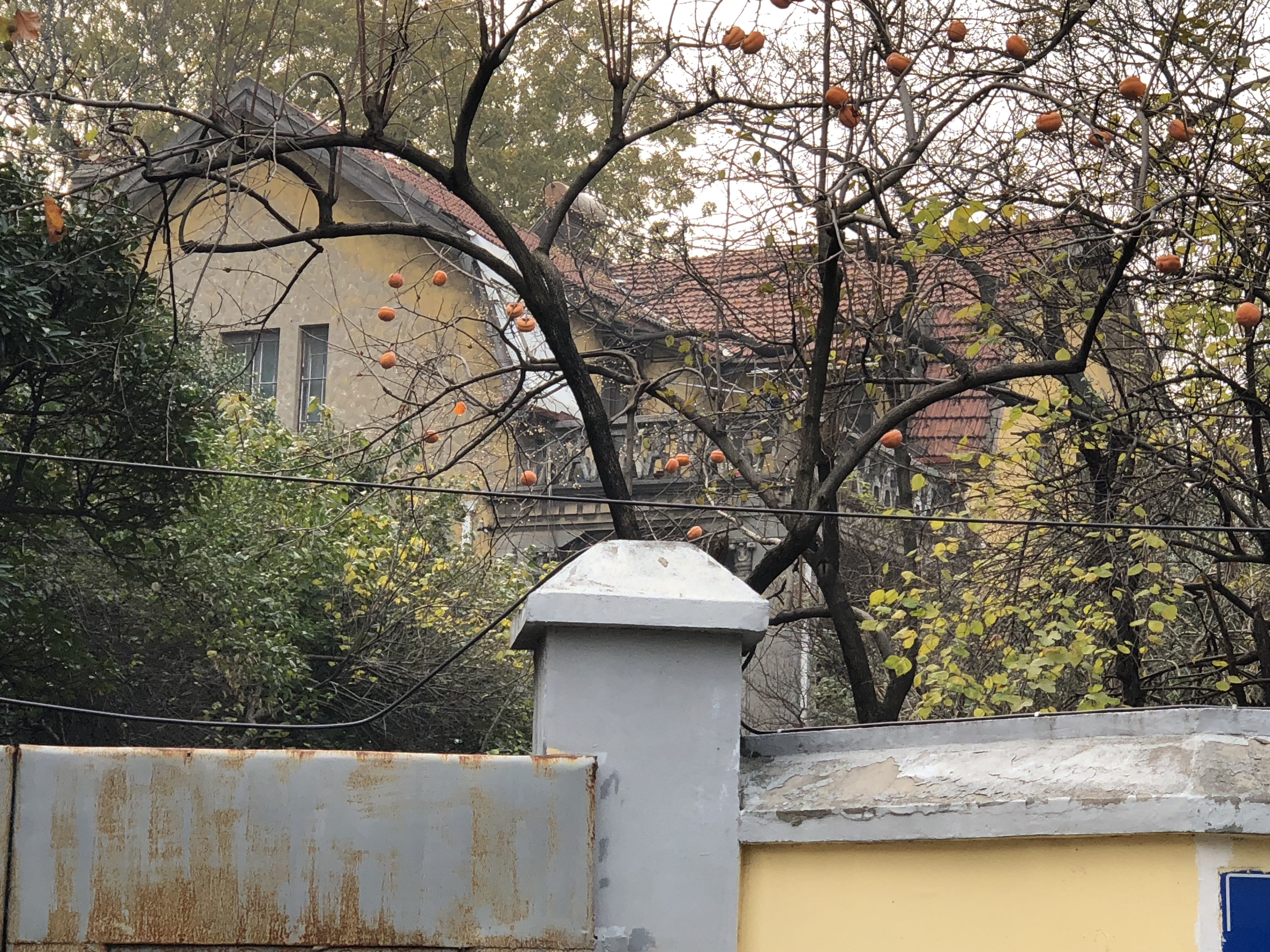 中文（中国大陆）: 波兰驻中华民国大使馆旧址